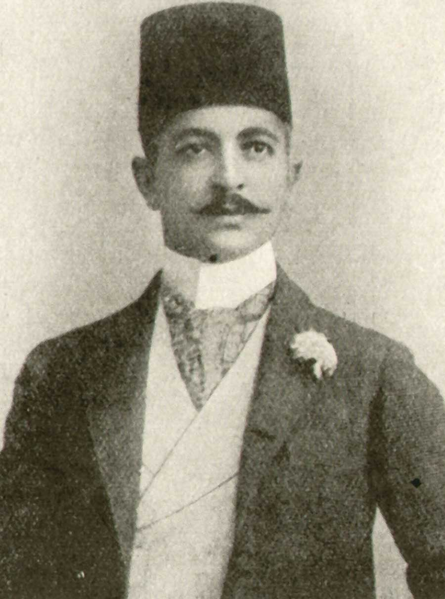 Said Halim Pasha (1863-1921), Ottoman Empire Grand Vizier